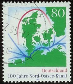 Briefmarke der Deutschen Post AG aus dem Jahre 1995, Jubiläum 100 Jahre Nord-Ostsee-Kanal